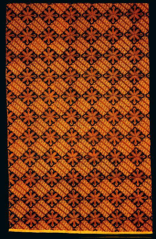 Wikkelrok. Katoenen wikkelrok met geometrisch patroon